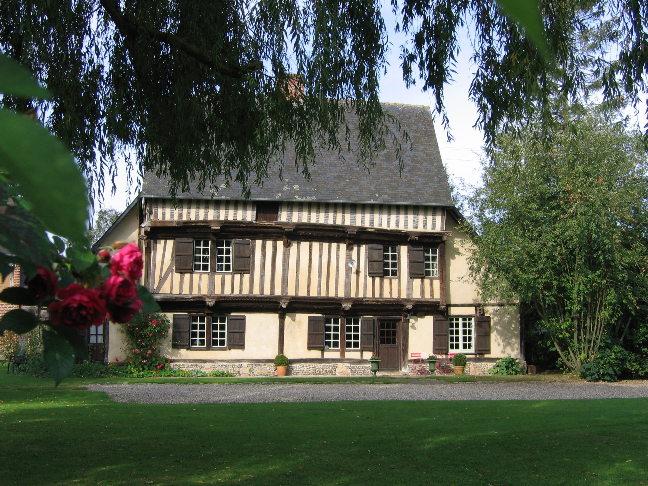 façade du Prieuré de Saint-Arnoult